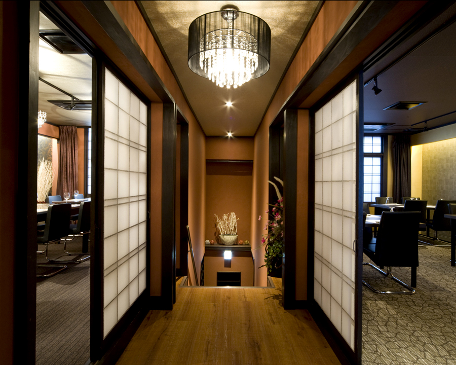 Guest room、Head office of Kissho 吉祥吉 本店内